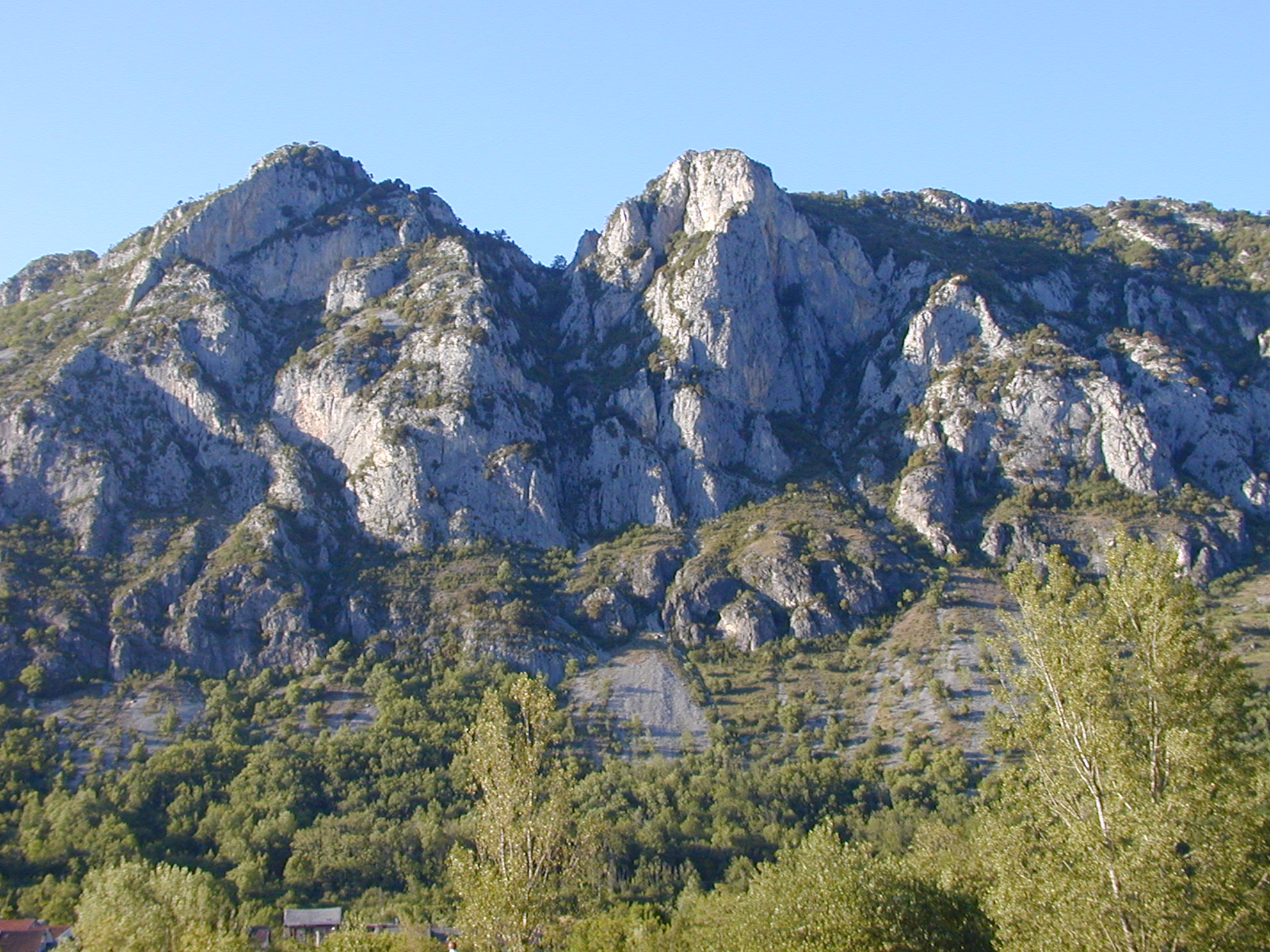 Midi-Pyrénées, Ariège, Surba : le Sédour.